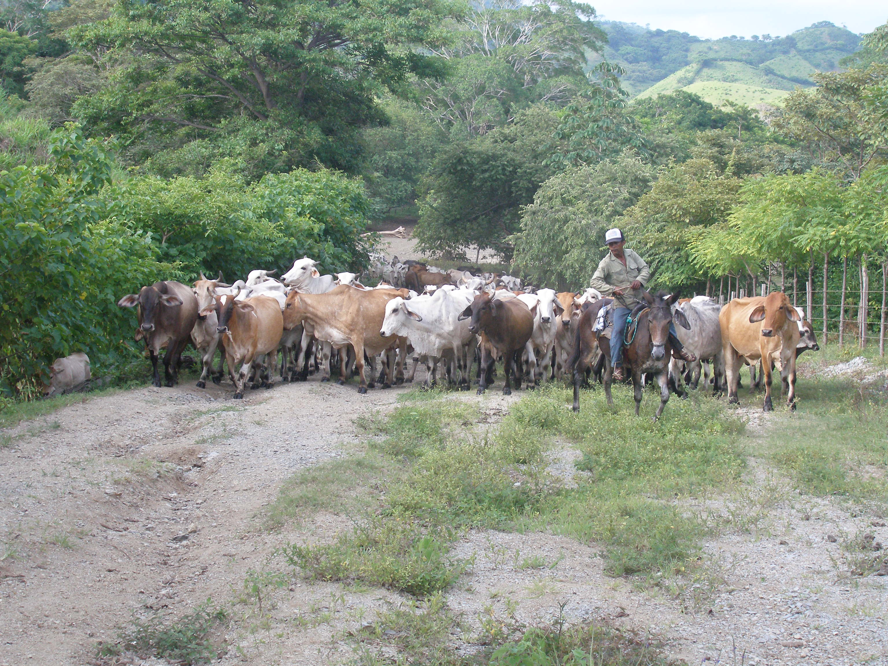 Arreo de ganado en Cambutal, Los Santos